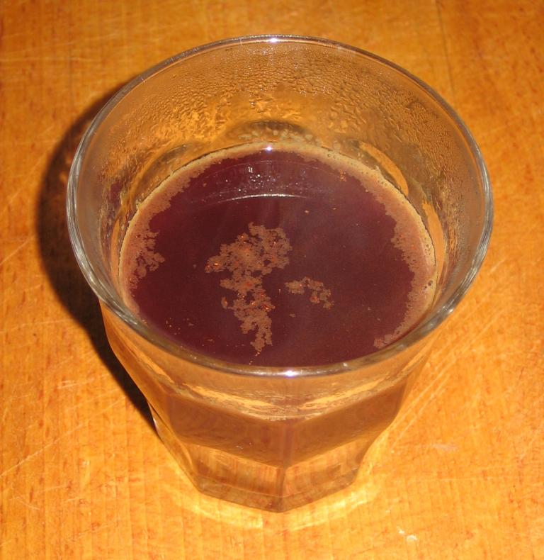 Verre de Vin chaud